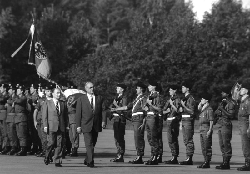 Am 24. September 1987 nahmen Bundeskanzler Dr. Helmut Kohl und der französische Staatspräsident Francois Mitterrand an der deutsch-französischen Heeresübung Kecker Spatz teil. Die Übung wurde vom II. deutschen Korps mit 55.000 Mann und von der französischen schnellen Eingreiftruppe (FAR) mit 20.000 Mann in Bayern und Baden-Württemberg durchgeführt. Es war dies die bisher größte deutsch-französische Übung. Im Bild: Ankunft in Manching Staatspräsident Mitterrand und Bundeskanzler Kohl (v.l.n.r.) schreiten eine deutsch-französische Ehrenkompanie ab.